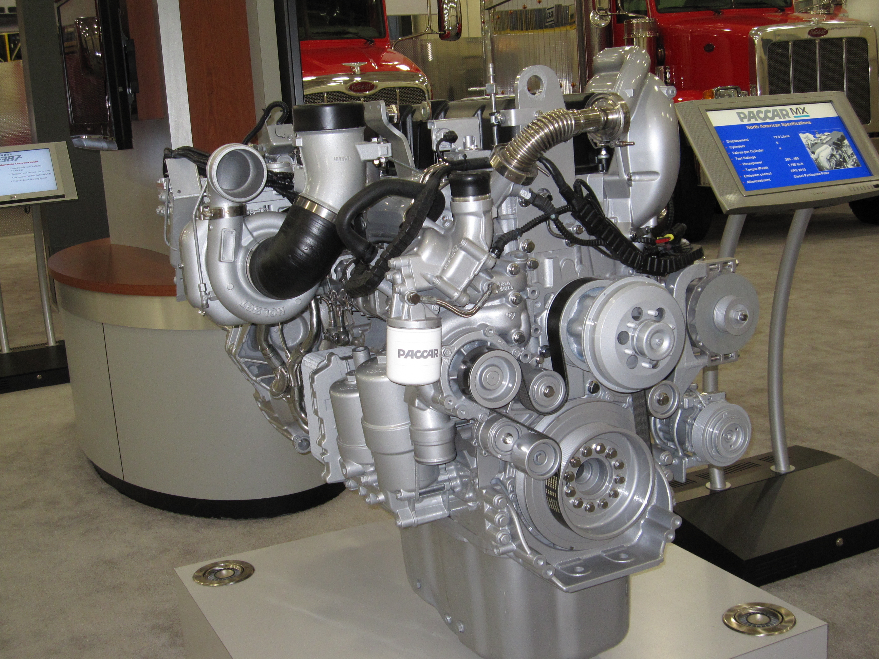 Peterbilt truck